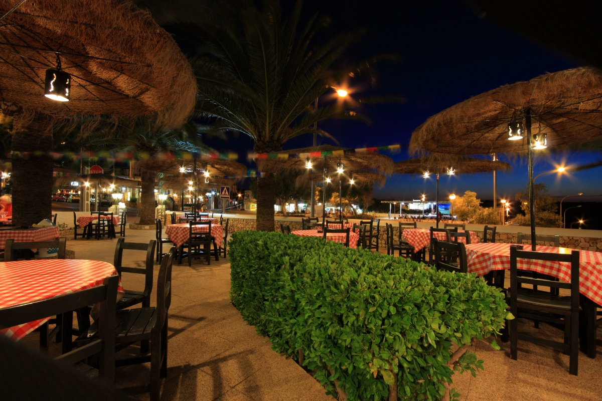 Cala n Porter, Menorca